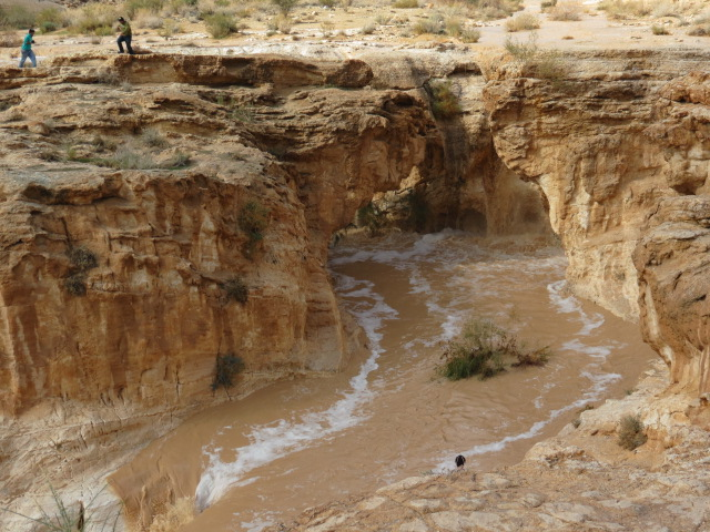 Ein Yorke'am, Nachal Hatira, Ma'ale Eli עין ירקעם, נחל חתירה, מעלה עלי